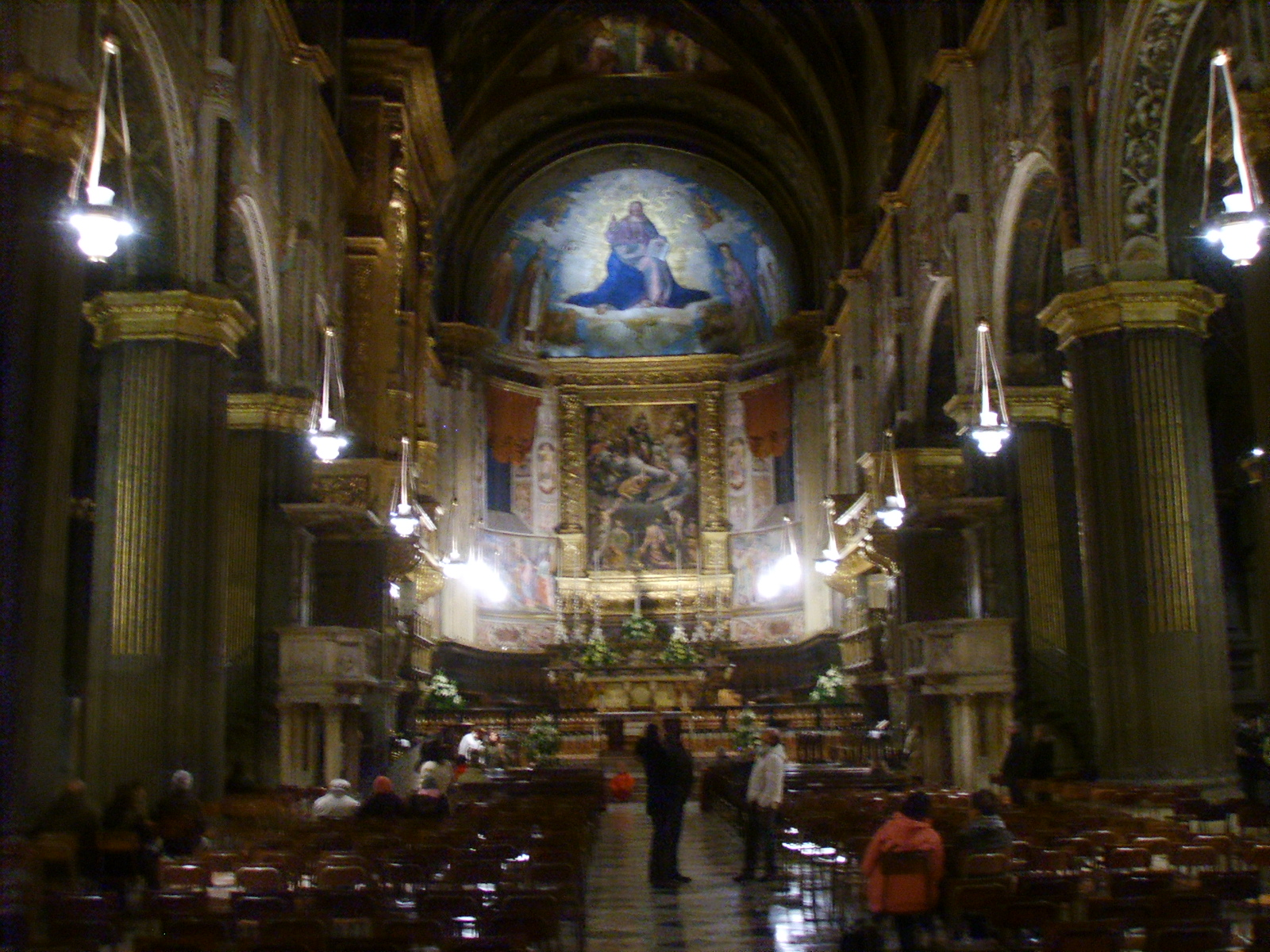 Cremona, duomo, interno